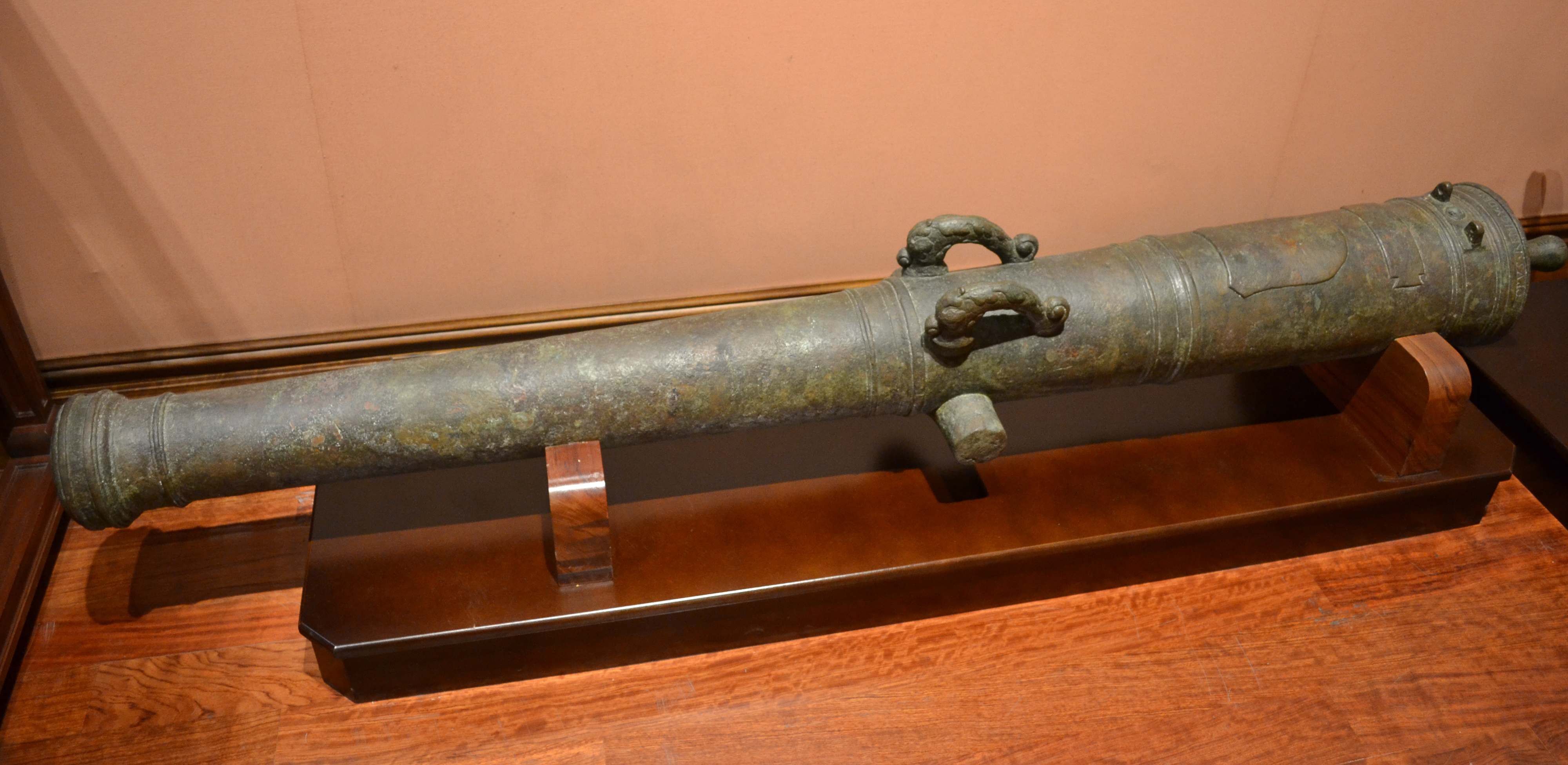 Falcón de bronce. Remi de Halut (1553). Nº inv. 6968. Museo Naval de Madrid